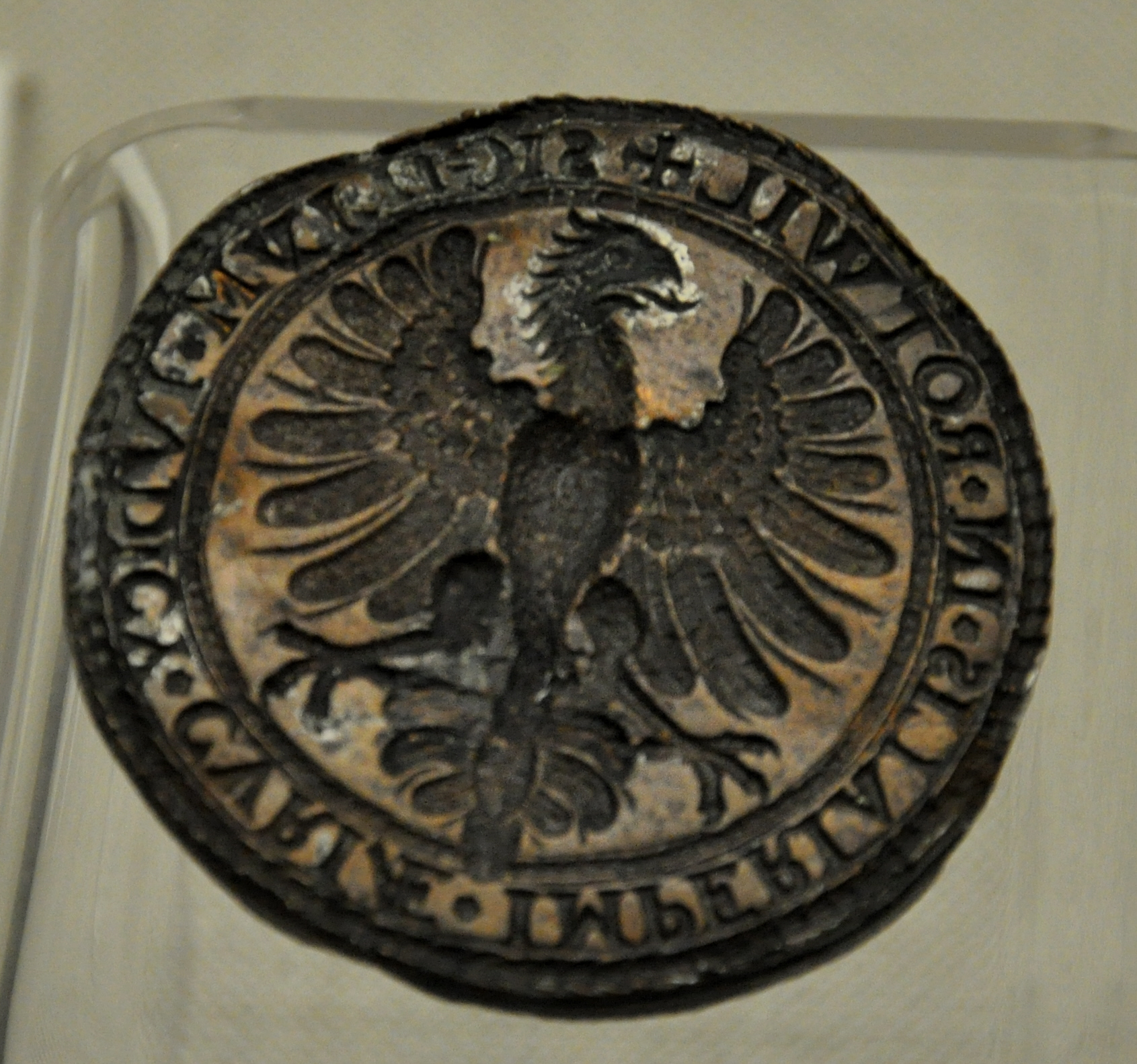 Siegel des kaiserlichen Hofgerichts Rottweil, Typar; Stadtmuseum Rottweil